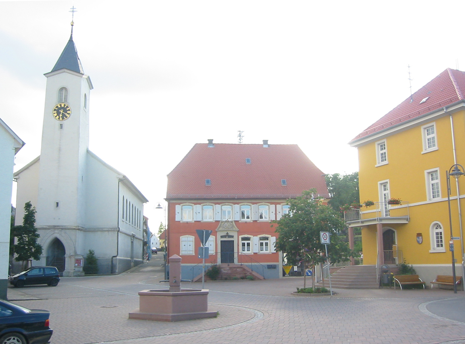 Marktplatz in Eschelbronn mit evangelischer Kirche